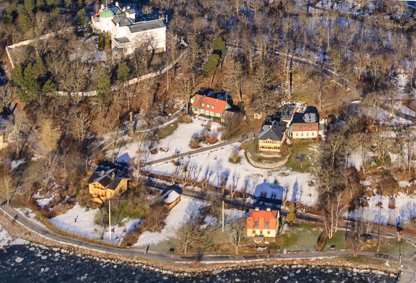 Del av Blockhusudden med Eolskulle och Johannisberg, Thielska villan, villa Eolslund och Stora sjötullen (hus 3).